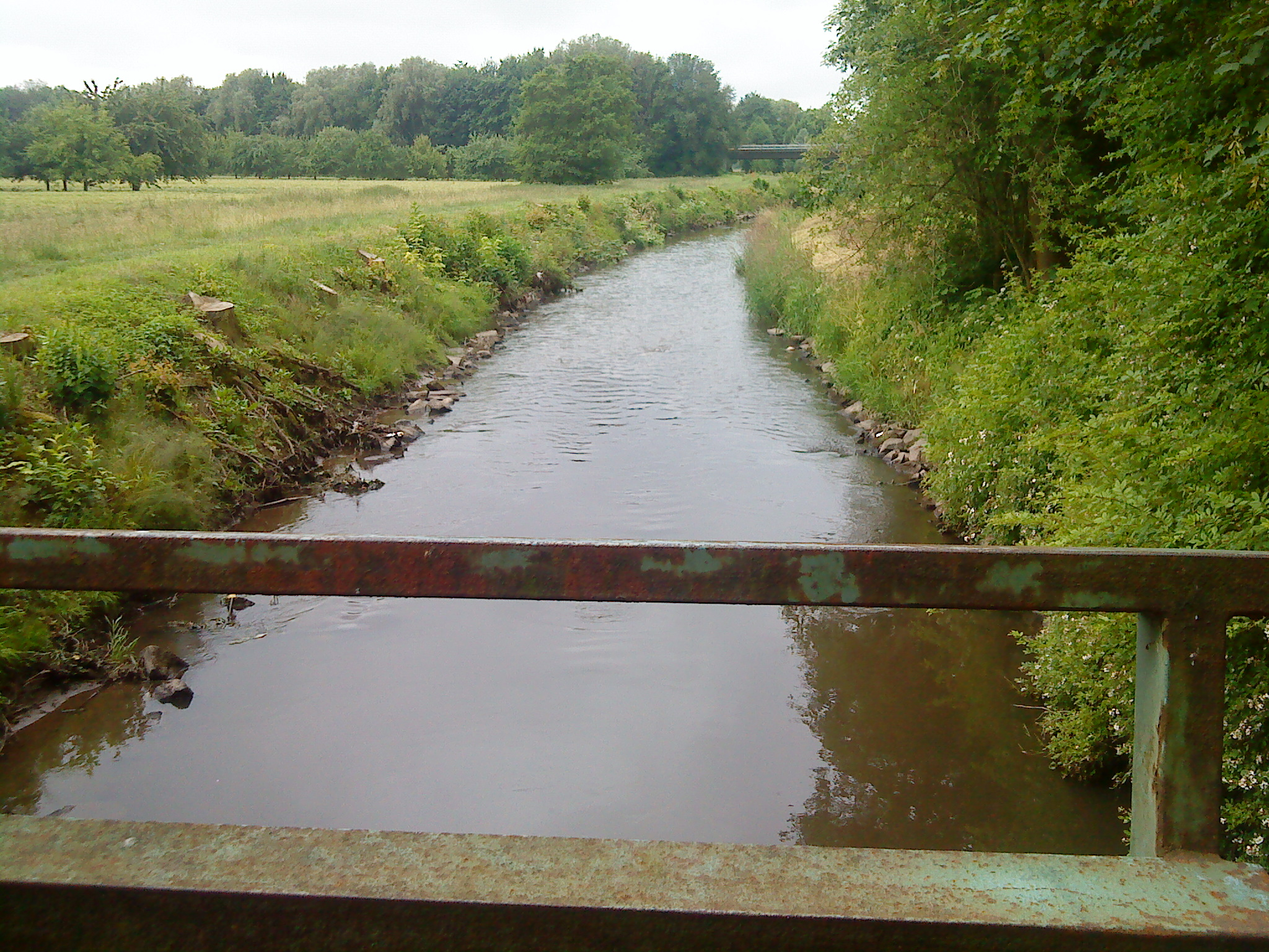 Begradigte Kahl im Jahr 2009 mit Hochwasserschutzdamm bei Alzenau. 2013 wurde dieser Bereich mit künstlichen Mäandern (Flussschlingen) versehen.